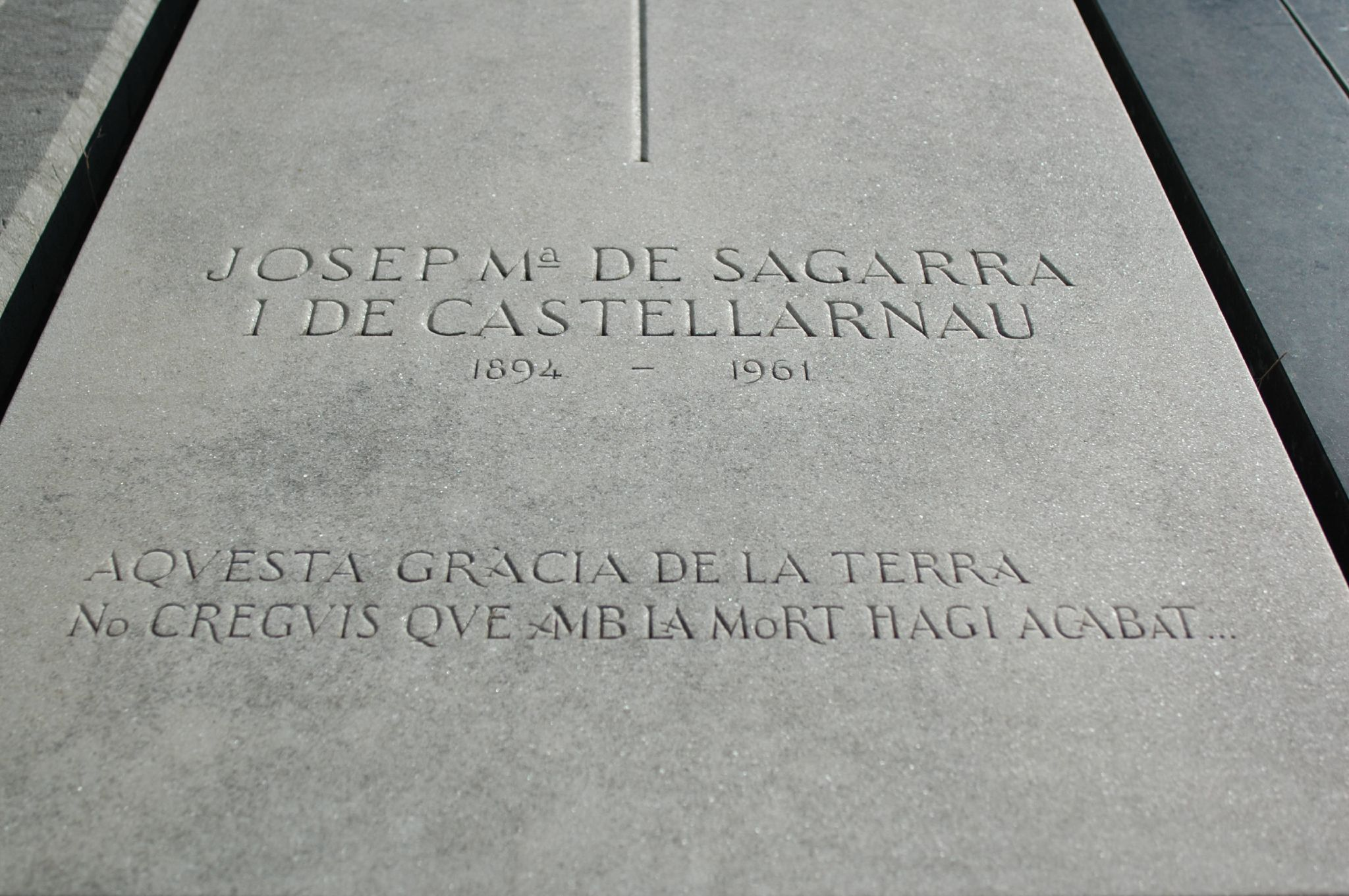 Tomba de Josep Maria de Sagarra (Barcelona, Catalunya).